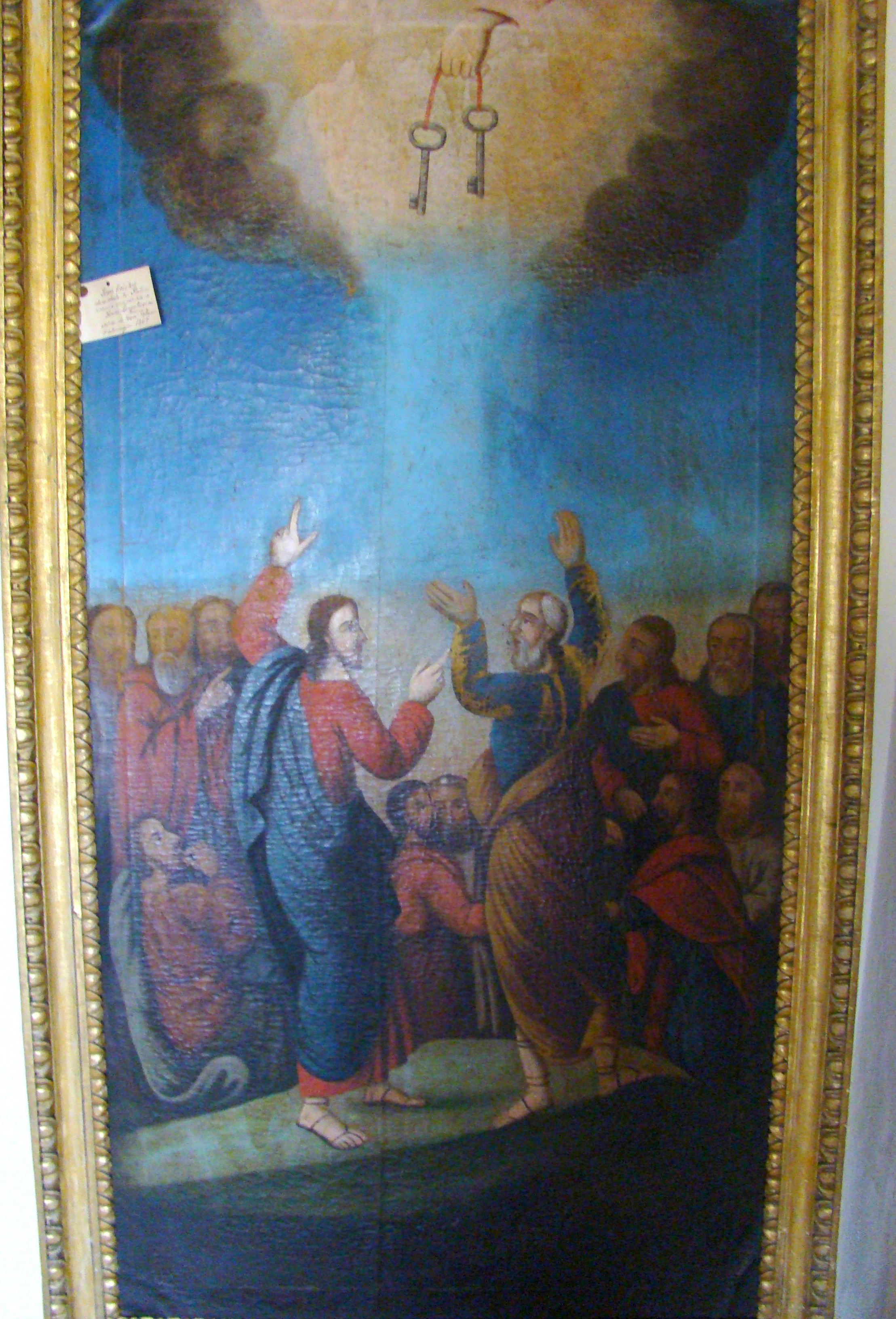 Biserica „Nașterea Născătoarei de Dumnezeu" din Hălmagiu, județul Arad